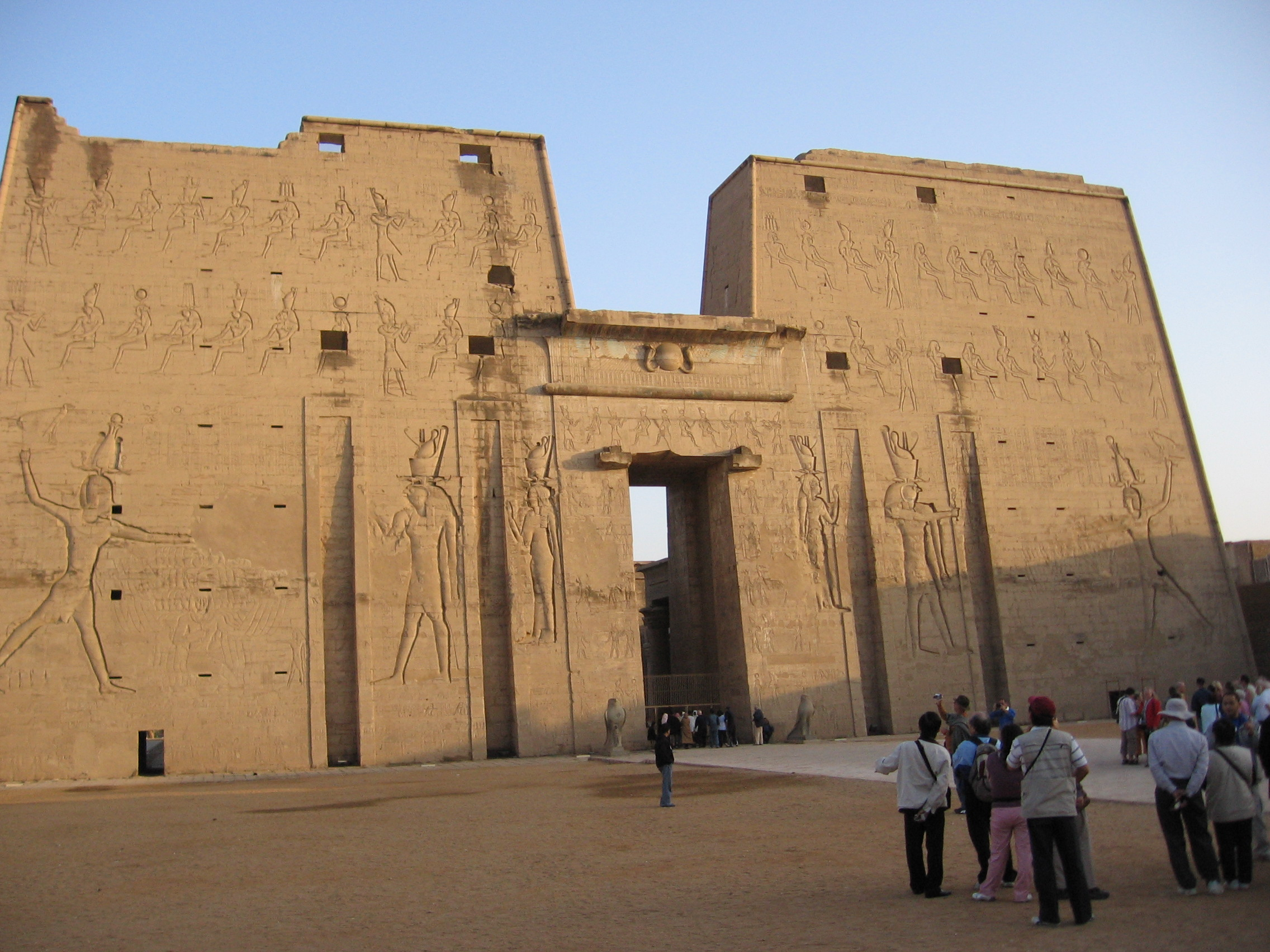 Edfu Tempel